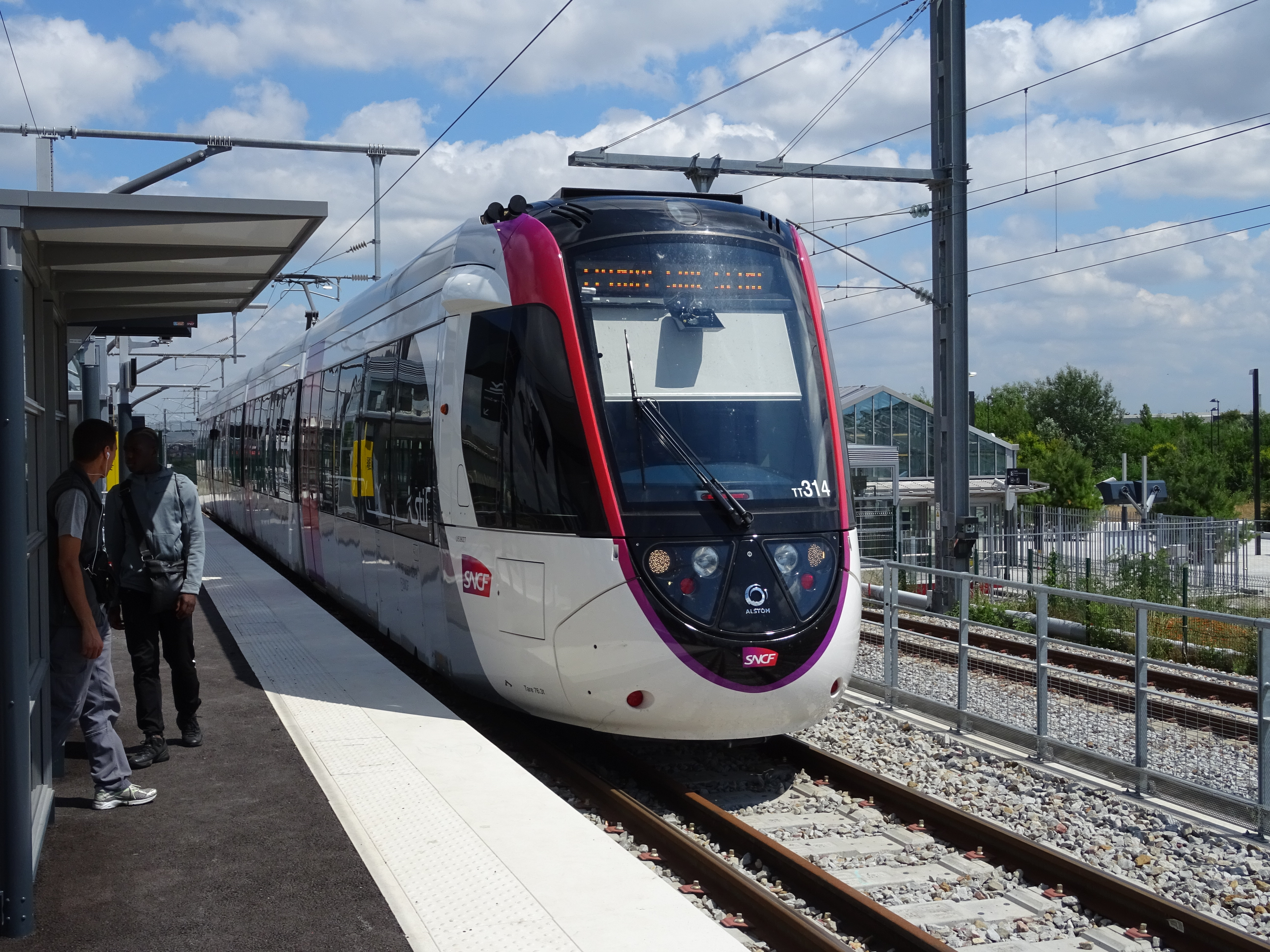 U 53600 en gare de Pierrefitte - Stains